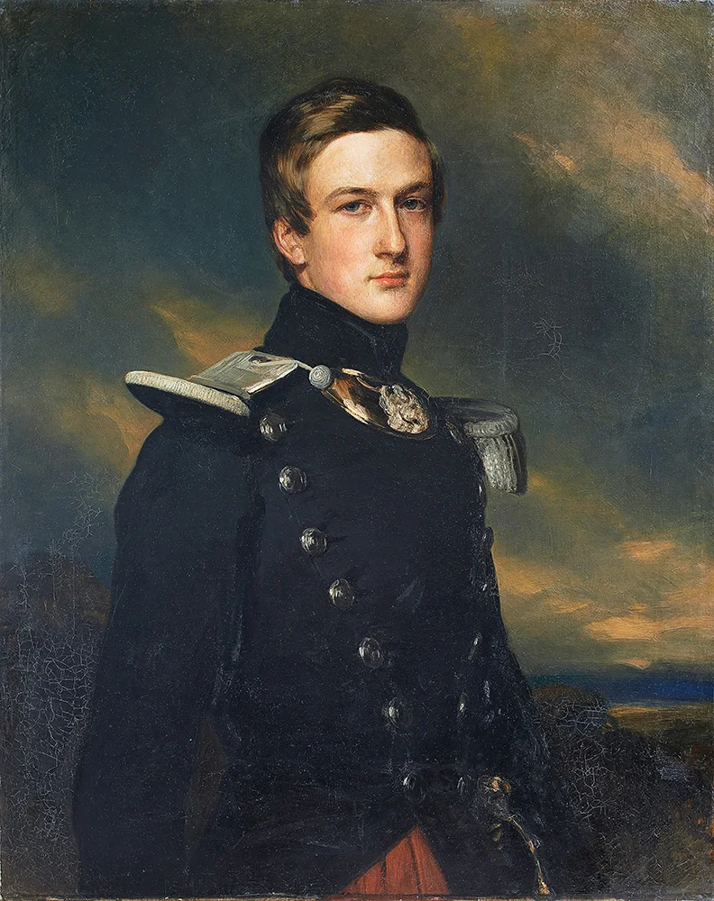 Porträt Henri-Eugène-Philippe-Emmanuels d’Orléans, Herzog von Aumale